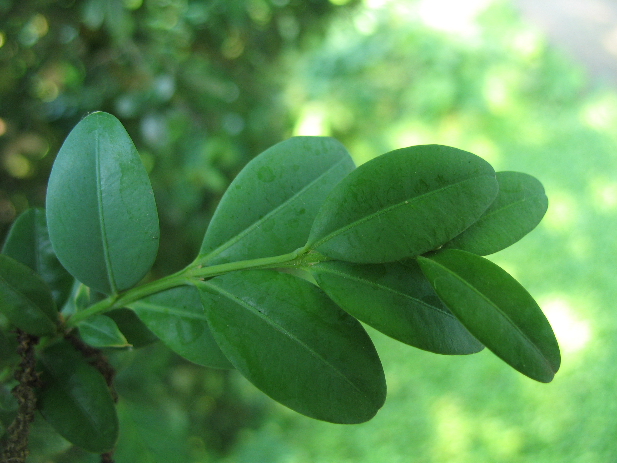 Bukszpan wiecznie zielony (Buxus sempervirens). Zdjęcie wykonane 25.06.2006 w Miejskim Ogrodzie Botanicznym w Zabrzu